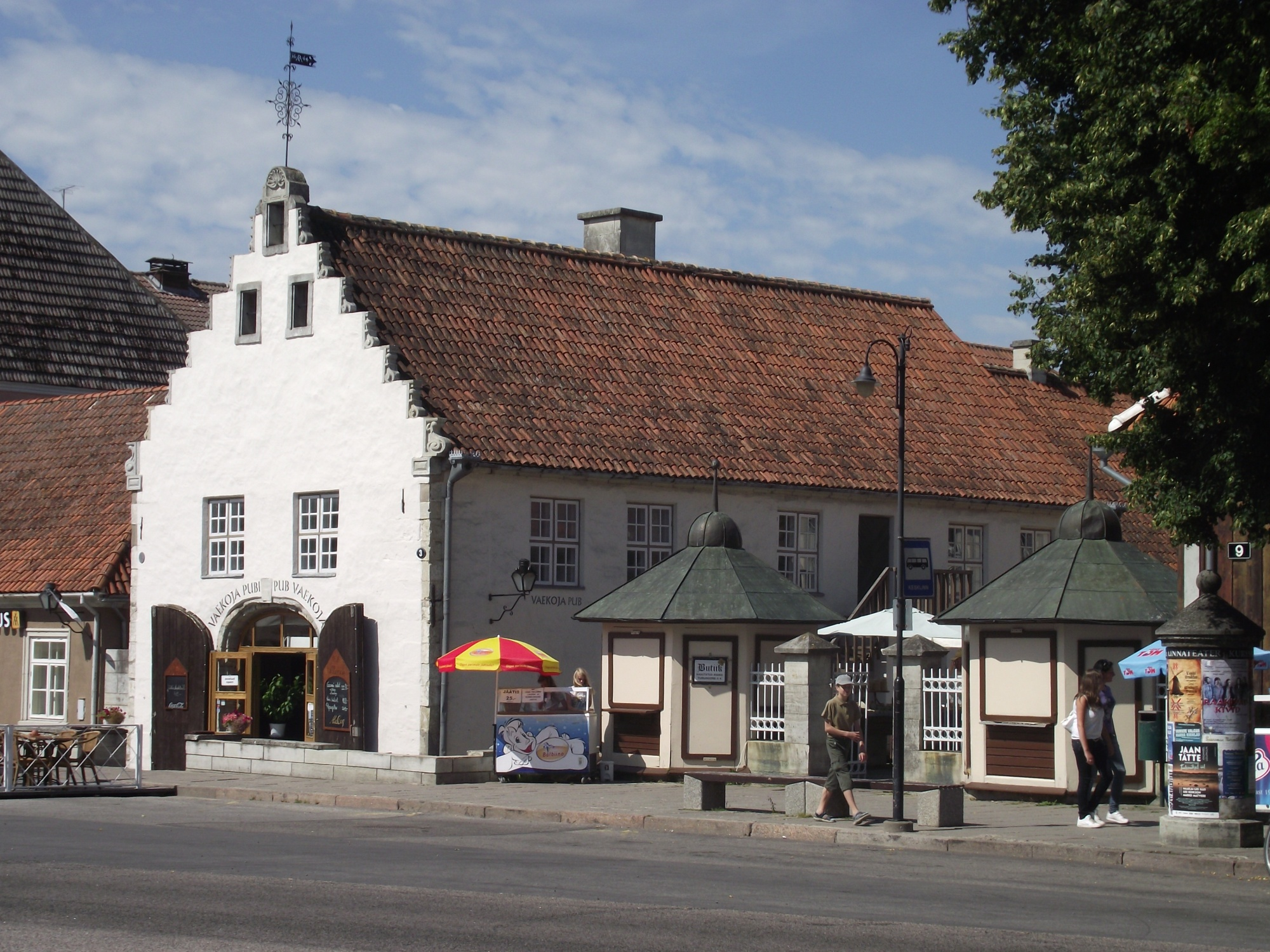 Kunagine Kuressaare vaekoda.